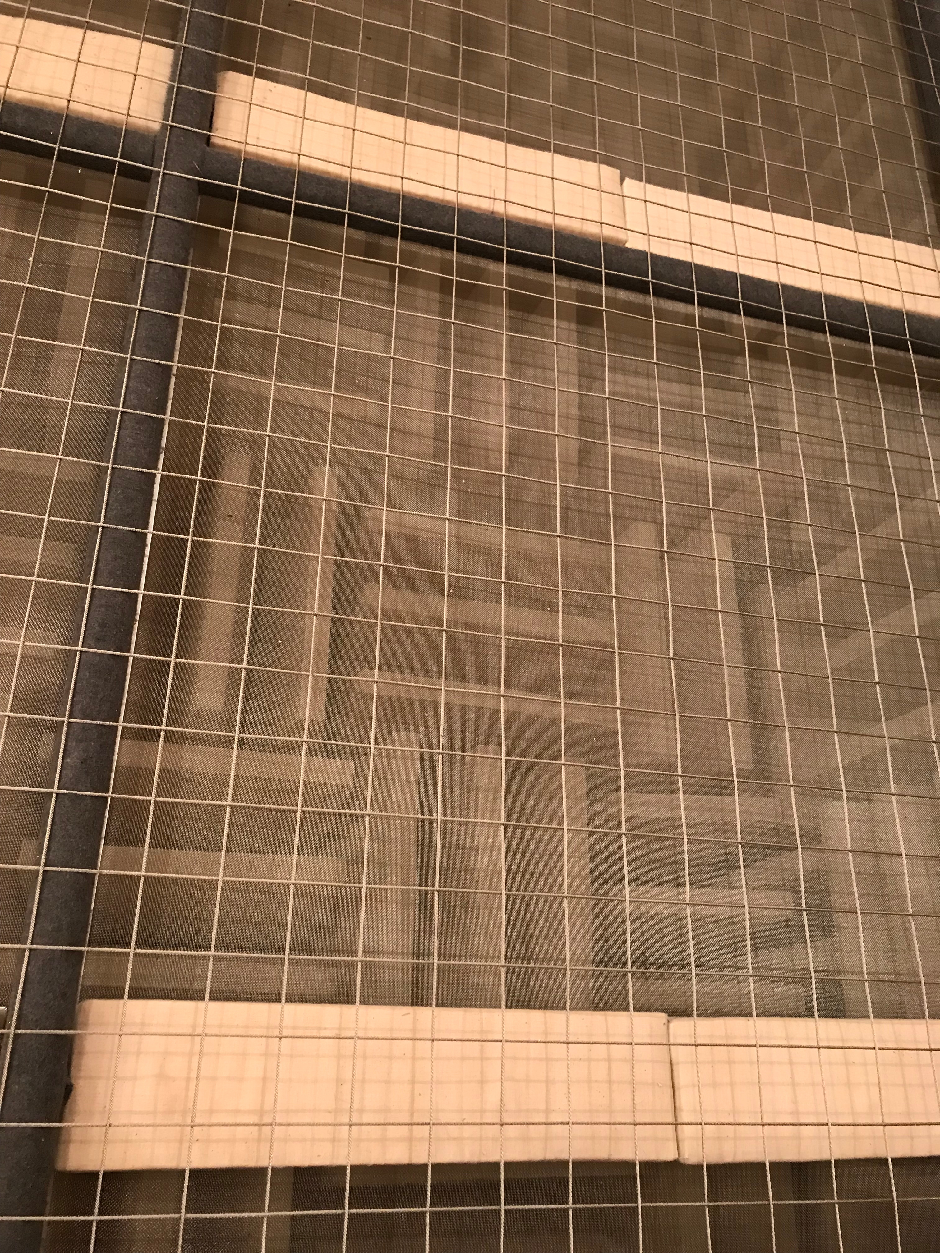 格子状にワイヤーが張られ、人はワイヤーの上を歩く。